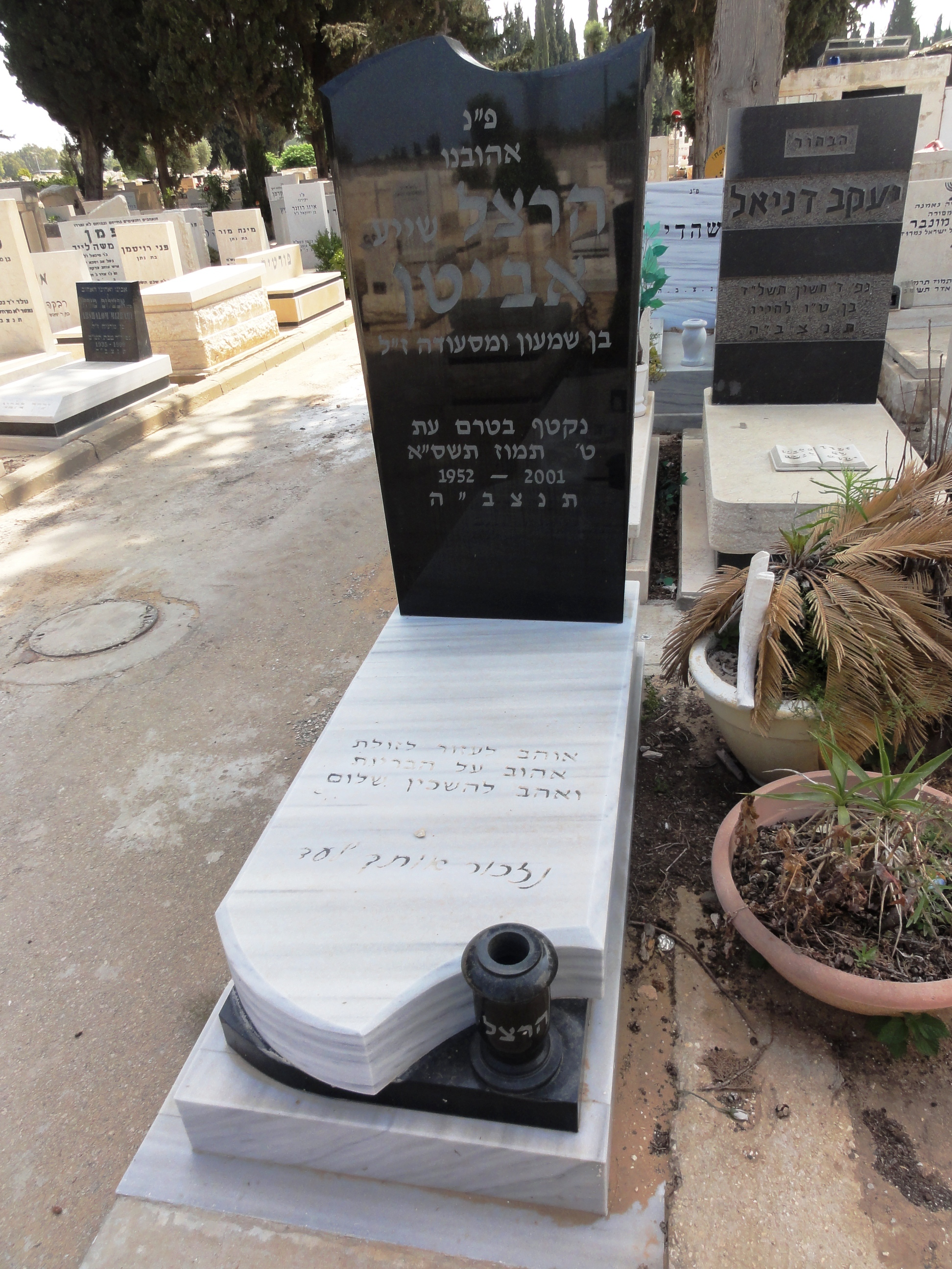 קברו של הרצל אביטן